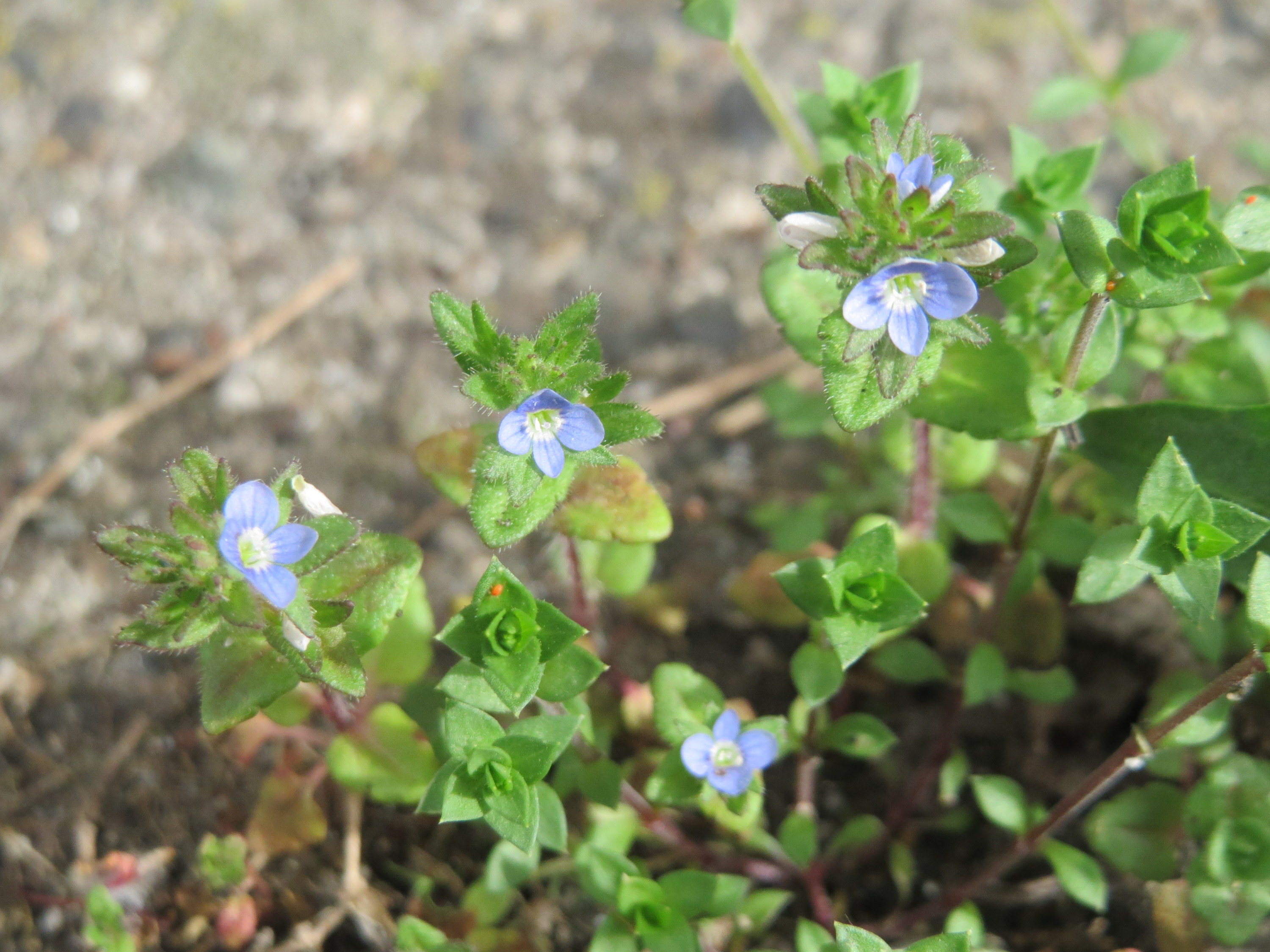 Ritzen-Botanik: Feld-Ehrenpreis (Veronica arvensis) in Hockenheim